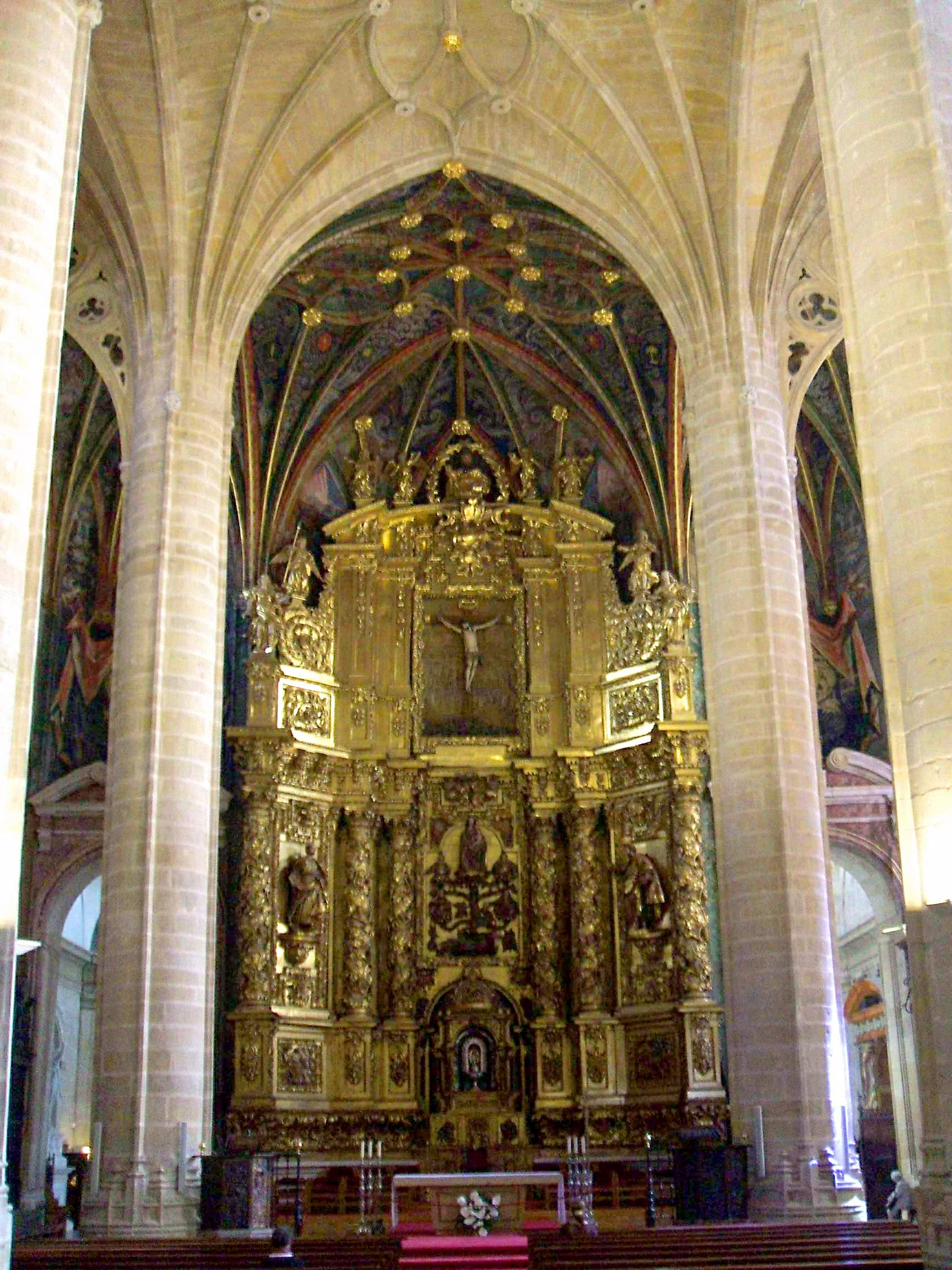 Catedral de Santa María la Redonda, Logroño (La Rioja)